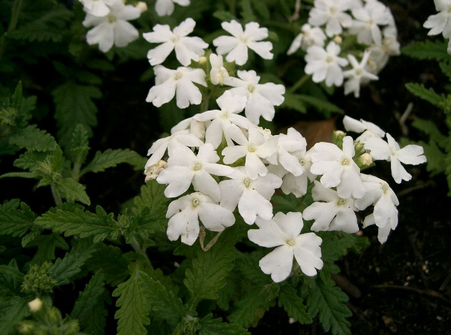 Verbena 'Obssesion White'